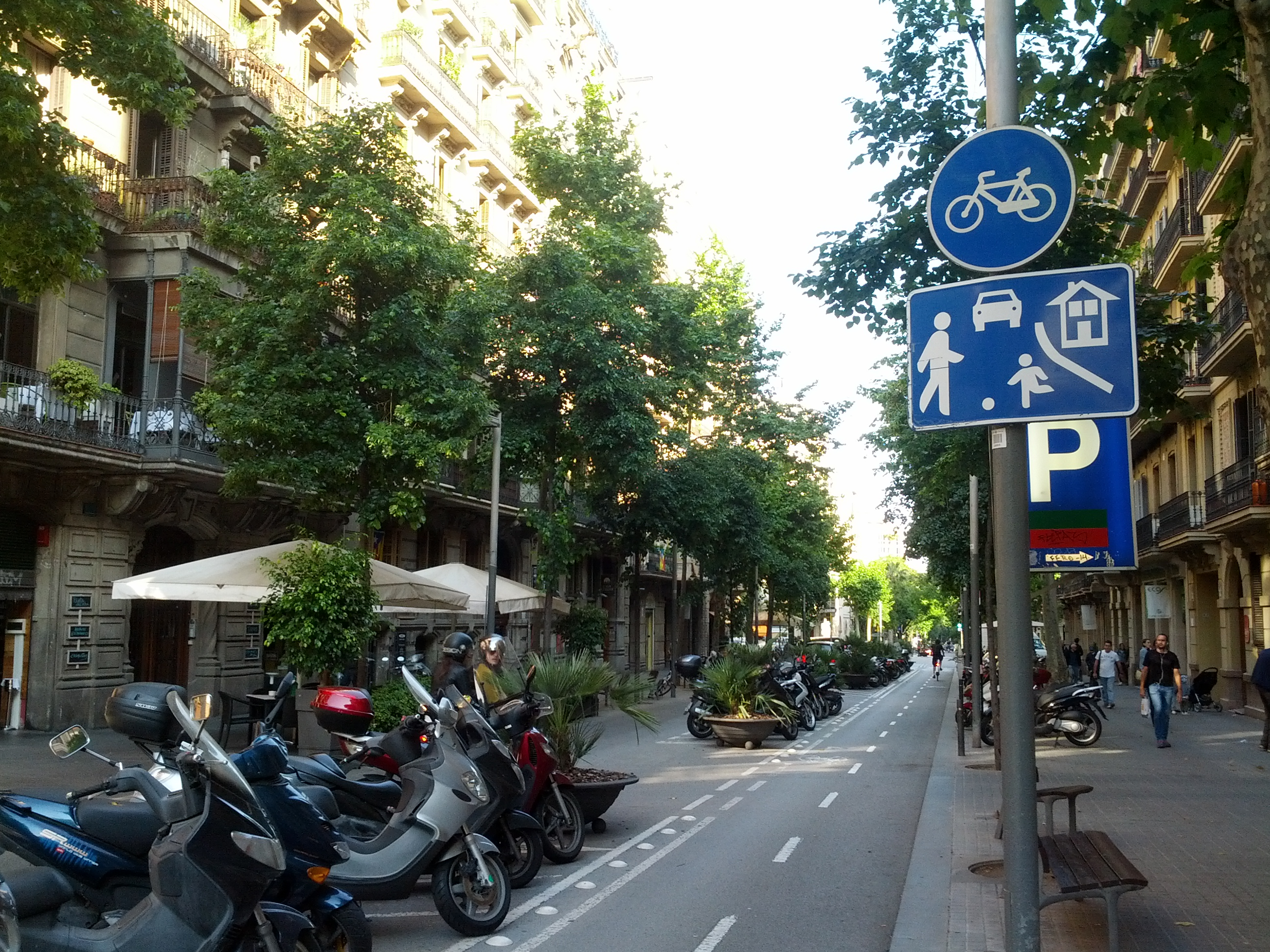 Barcelona in 2015